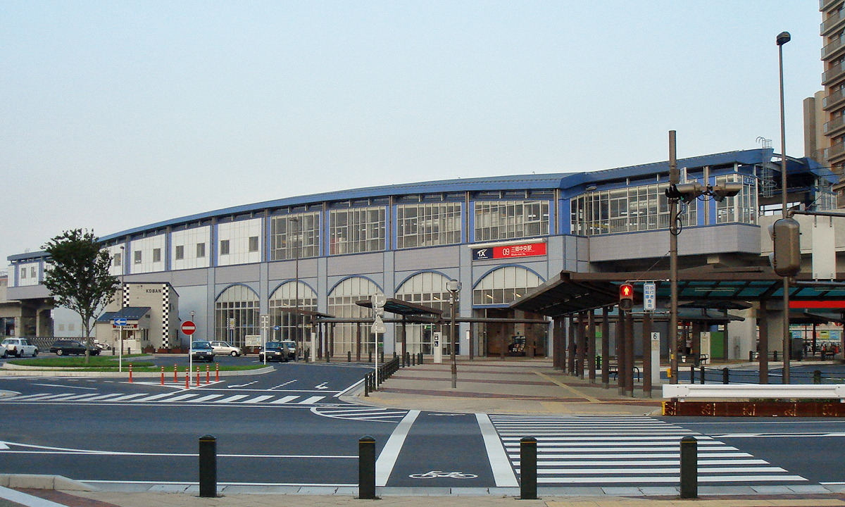 つくばエクスプレス三郷中央駅